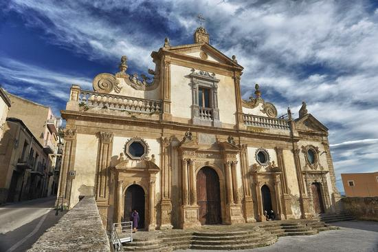 La Chiesa Madre di Leonforte,dove all' interno è custodita la maestosa vara della Madonna del Carmelo,patrona di Leonforte.